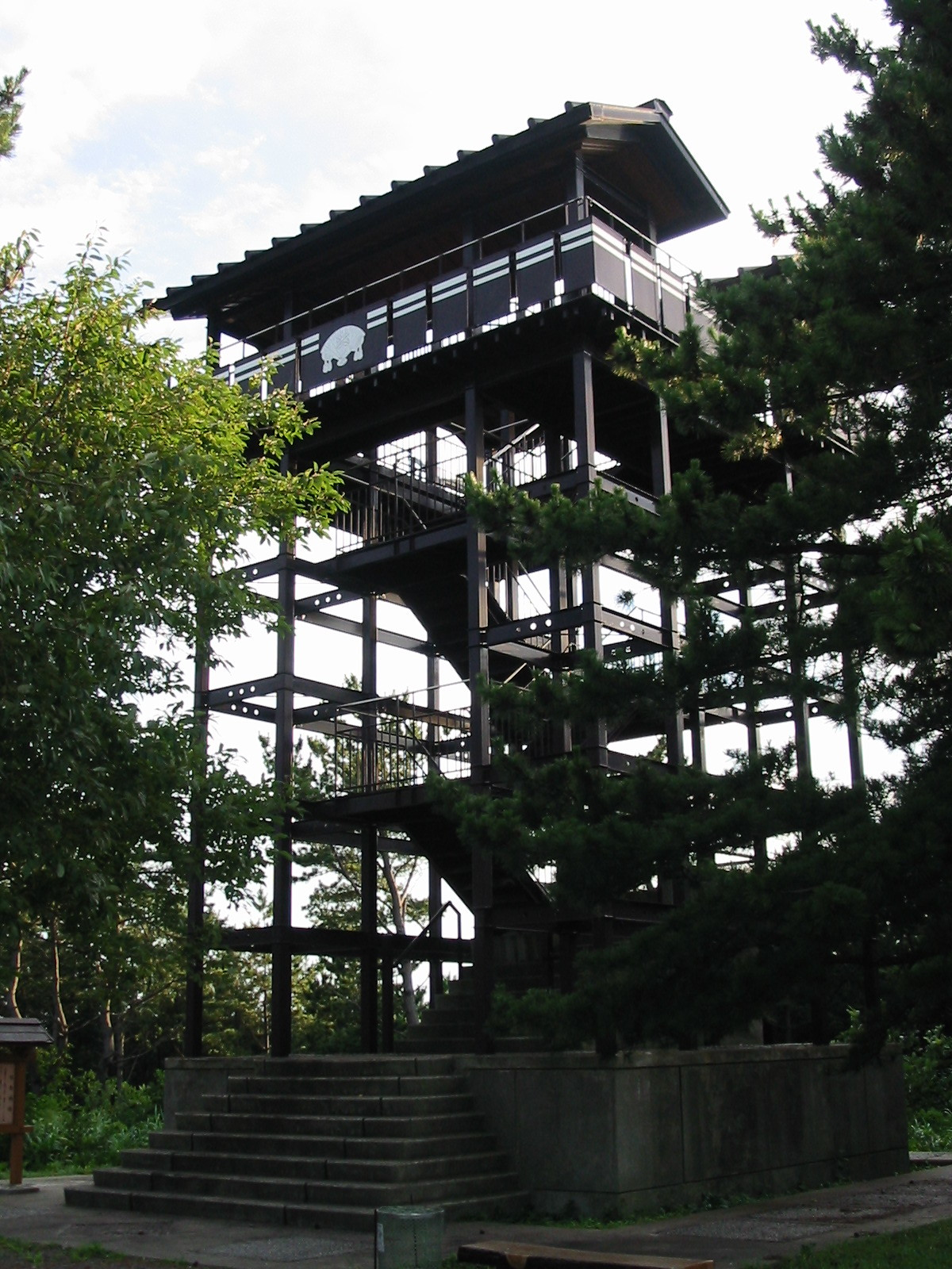 福島城跡(fukushimajyo-ato)